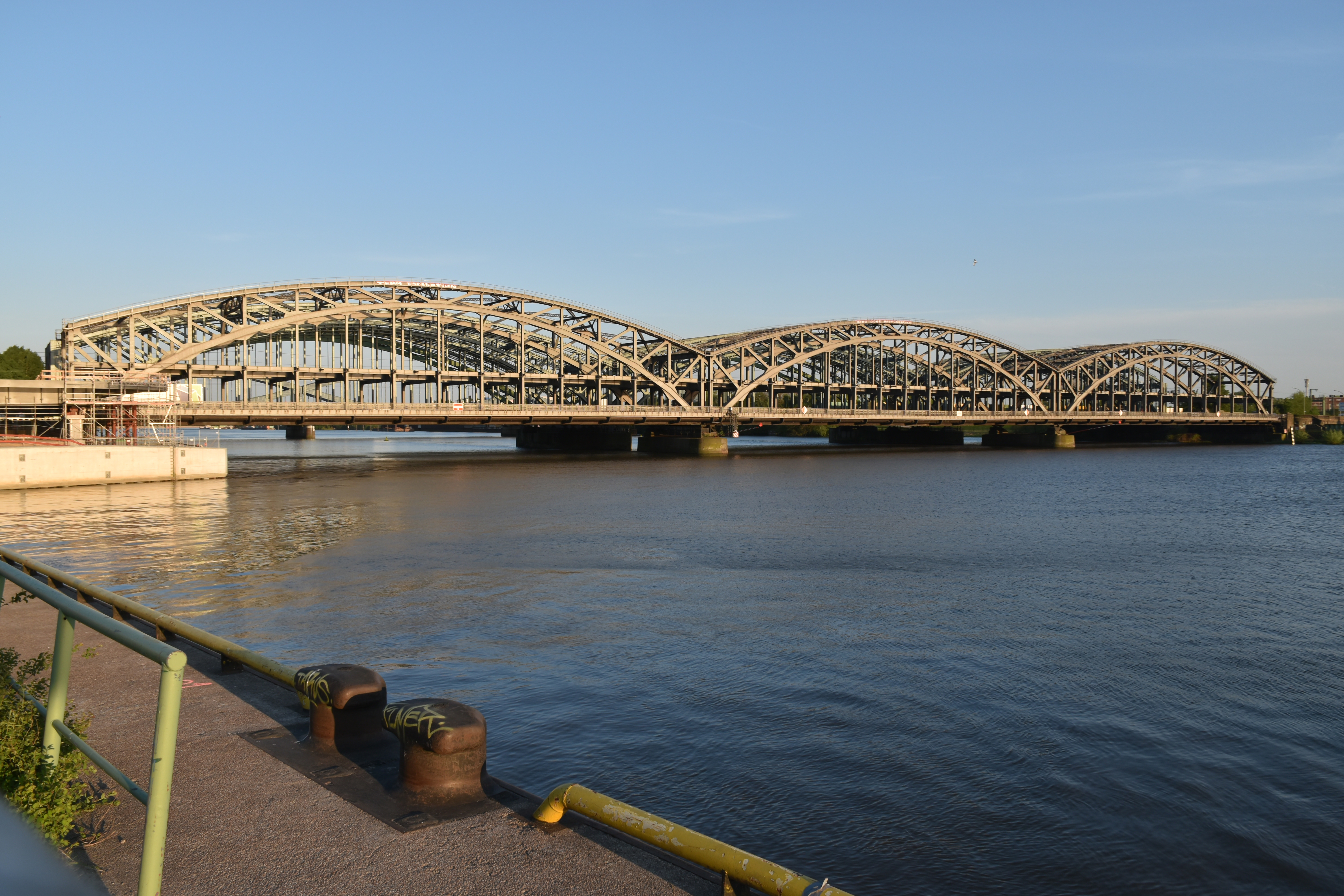 Freihafenelbbrücke